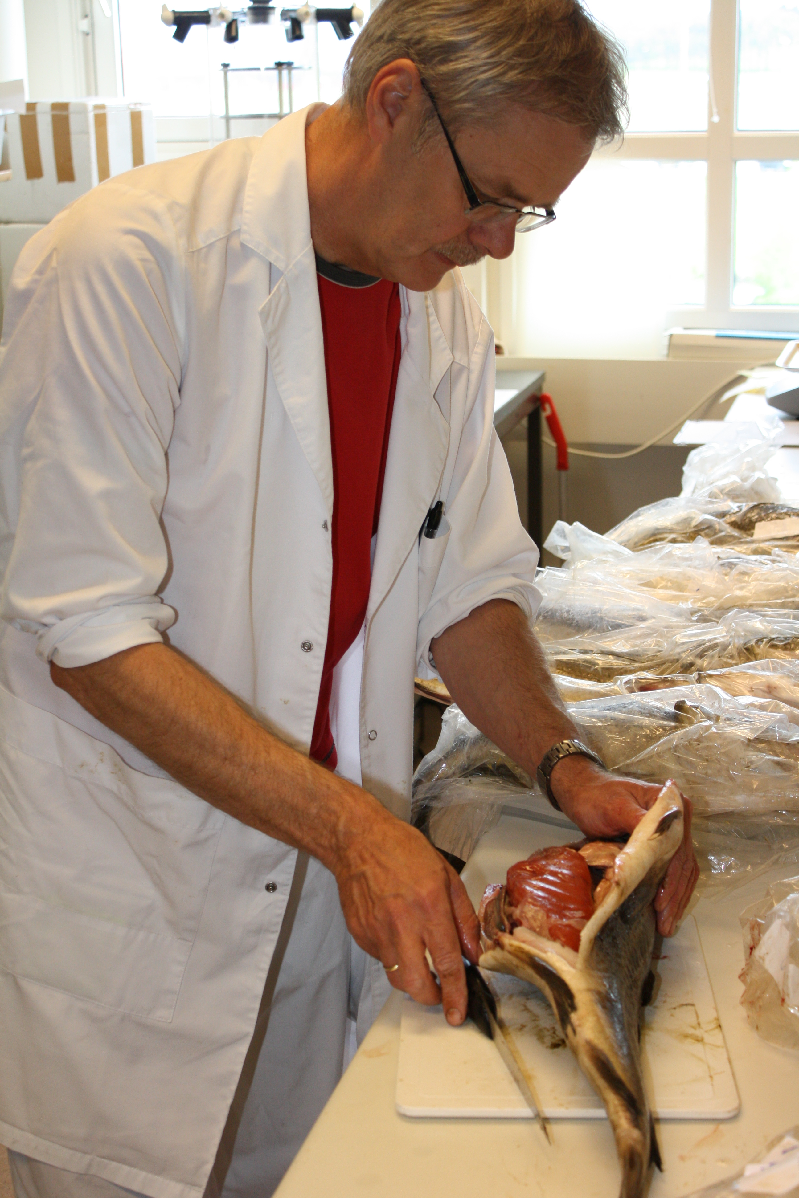 Overingeniør Arne-Magnus Jensen ved Analysesenteret henter ut lever av torsken. Les mer om prosjektet: Renere havn